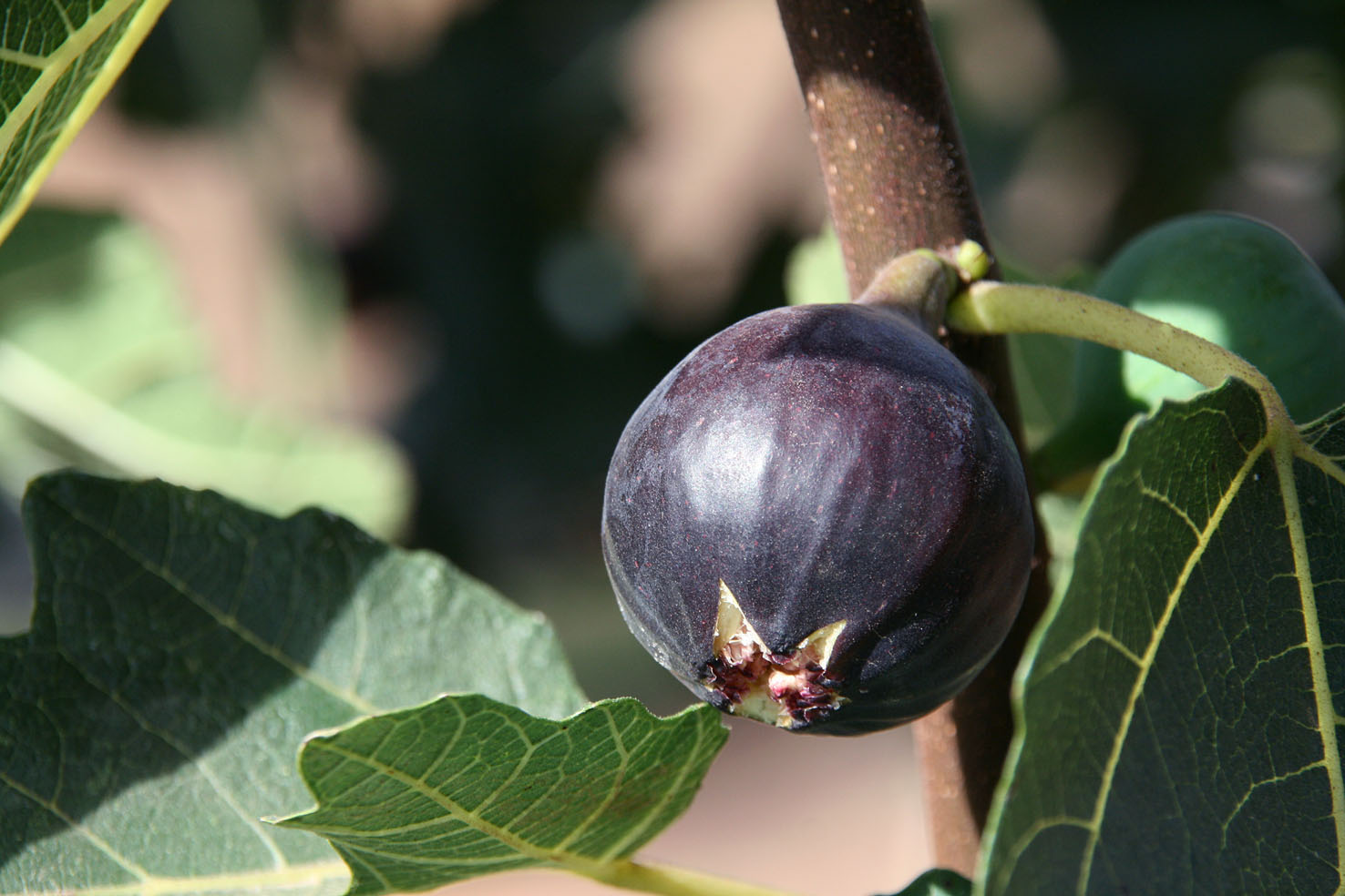 Figue chinoise Pinghu Ficus palmata x carica var. nahonis